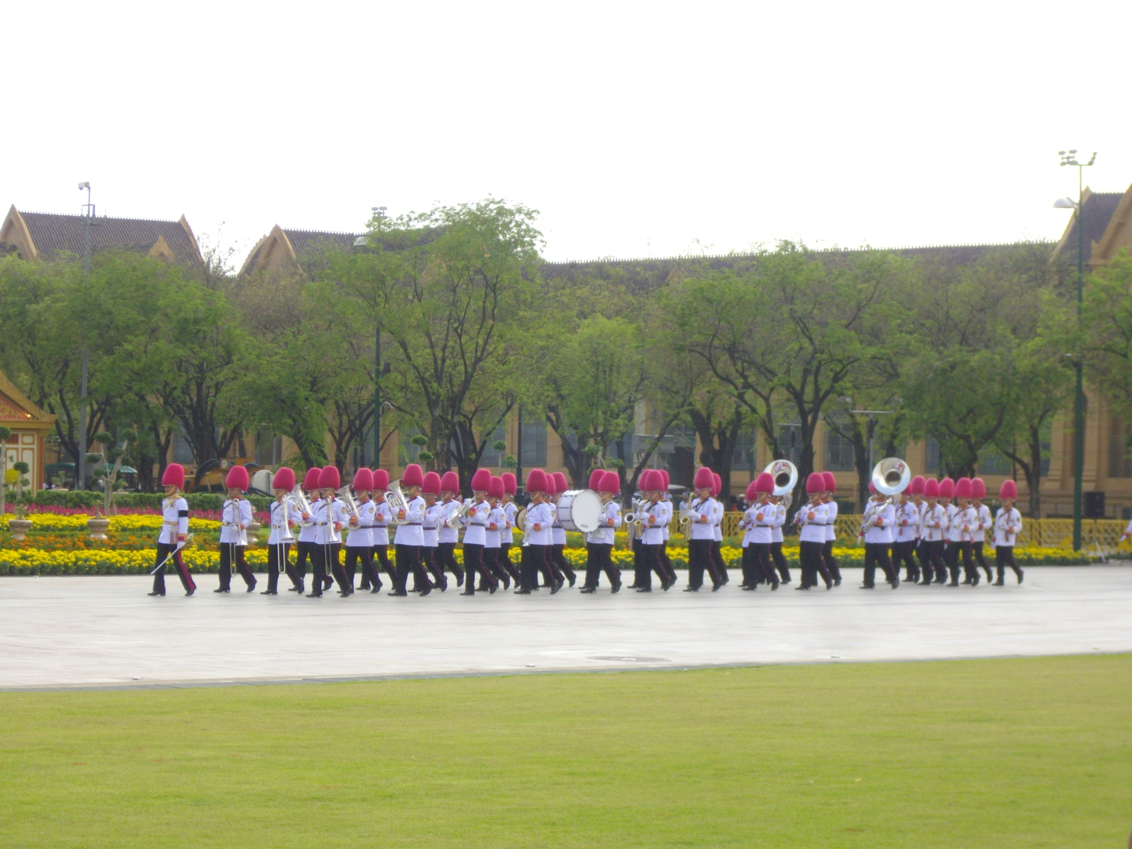 วงดุริยางค์กองพันทหารราบที่ 3 กรมทหารราบที่ 1 มหาดเล็กรักษาพระองค์ ในพระบาทสมเด็จพระมงกุฎเกล้าเจ้าอยู่หัว นำริ้วกระบวนกองทหารเกียรติยศสำหรับพระศพ สมเด็จพระเจ้าภคินีเธอ เจ้าฟ้าเพชรรัตนราชสุดา สิริโสภาพัณณวดี เข้าสู่บริเวณราชวัติของพระเมรุ เพื่อรับเสด็จพระบาทสมเด็จพระเจ้าอยู่หัว ในการพระราชพิธีพระราชทานเพลิงพระศพ ณ พระเมรุท้องสนามหลวง วันที่ 9 เมษายน พ.ศ. 2555